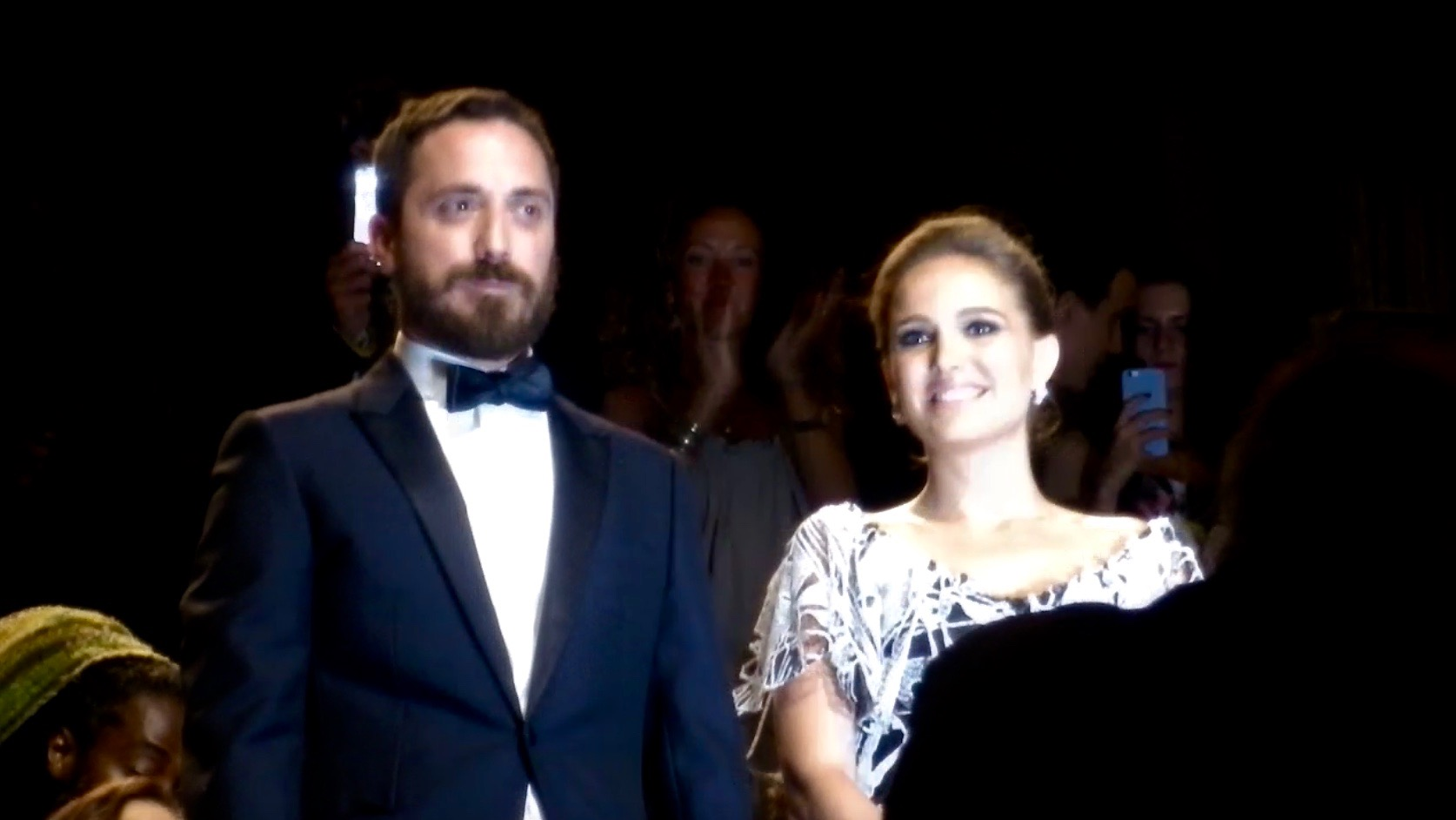 Pablo Larrain e Natalie Portman durante la presentazione del film "Jackie" durante il Festival di Venezia 2016